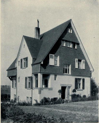 Haus Erb, Neckarsulmer Str. 71, Heilbronn. Bauwerk von Beutinger & Steiner